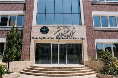 درب ورودی ساختمان ستاد حقوق بشر ایران - خیابان اسفندیار